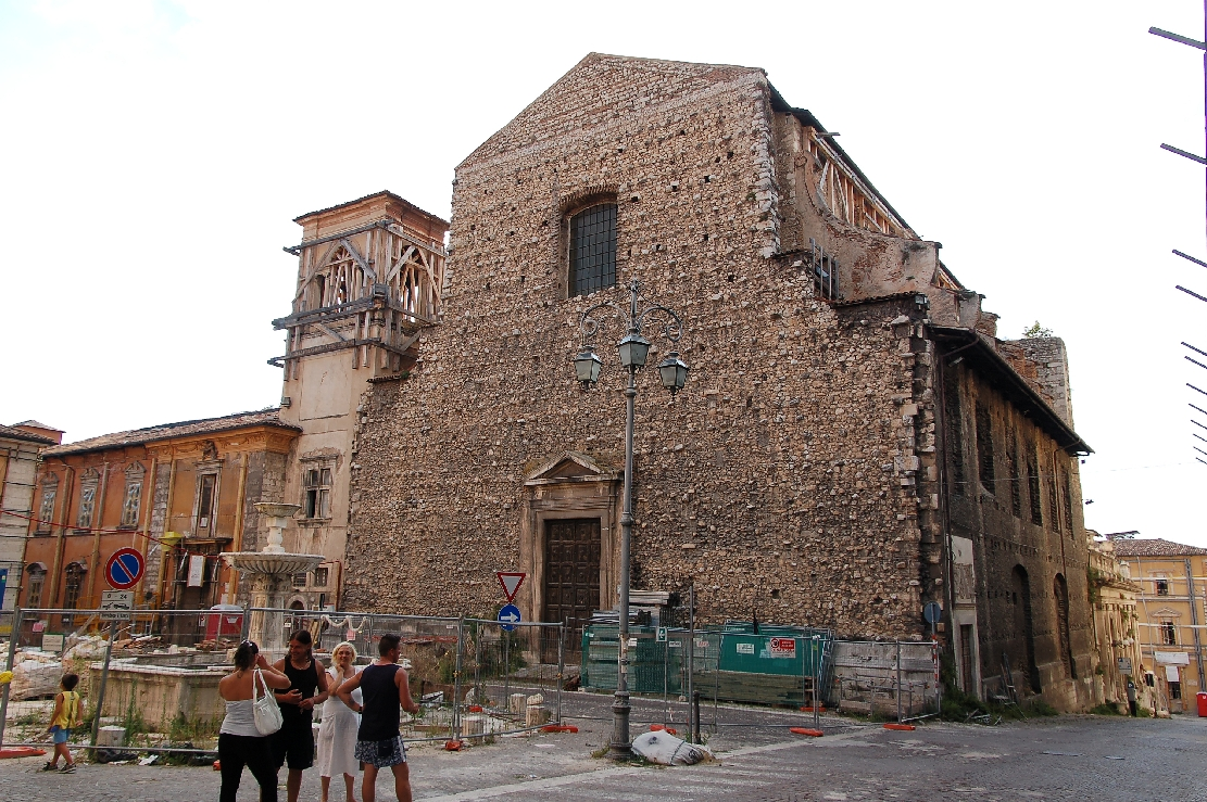 L'Aquila 2011